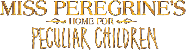 Logo de película "Miss Peregrine's Home for Peculiar Children".